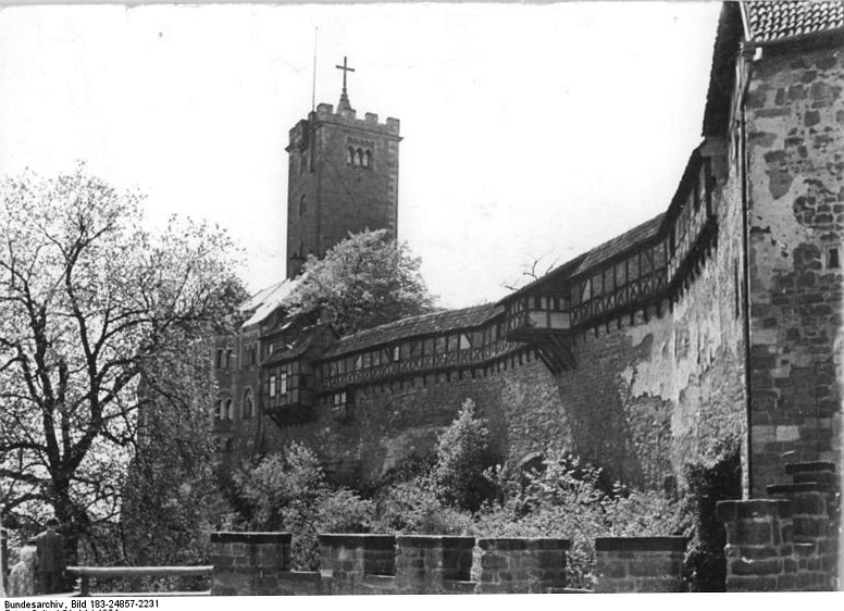 Eisenach, Wartburg Zentralbild TBD-Opitz 21.5.1954 Wjt.-Eg. Die Wartburg-Symbol der deutschen Einheit. UBz: Die Wartburg.